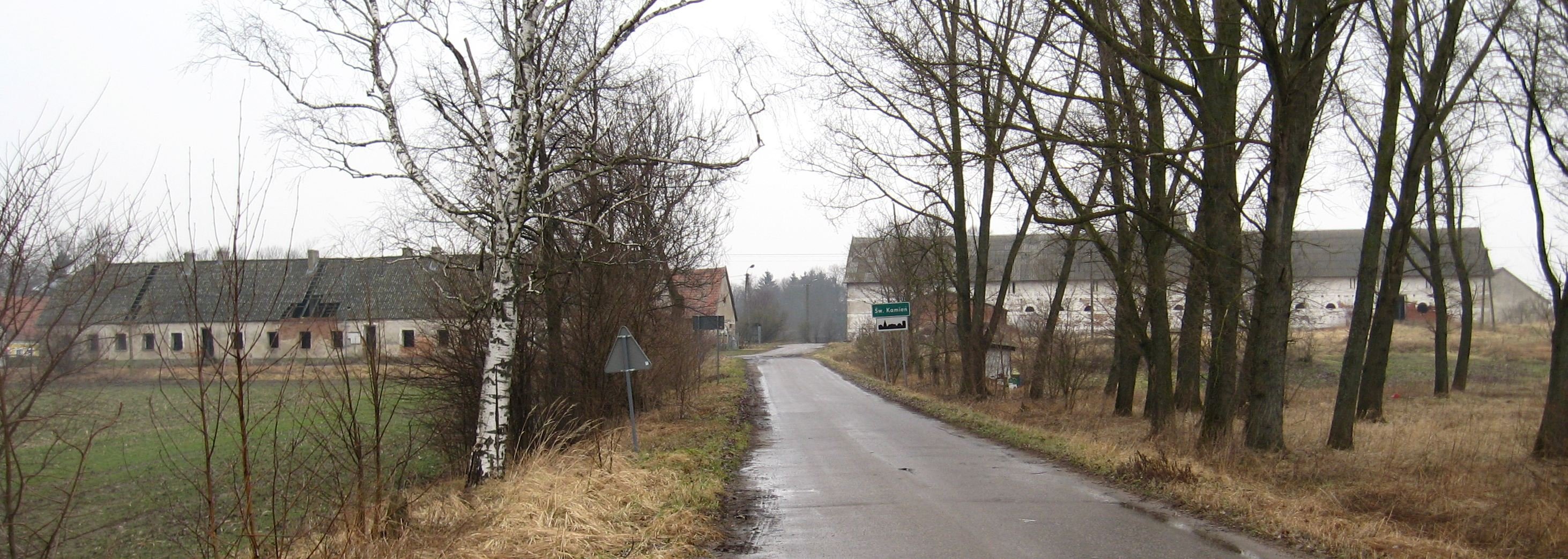 Święty Kamień (powiat kętrzyński) - OpenStreetMap (Info)